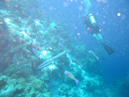 Dyk vid väggen ca 400m sydväst om på Klein Curacao 2005-06-05 på ca 15m djup 28C